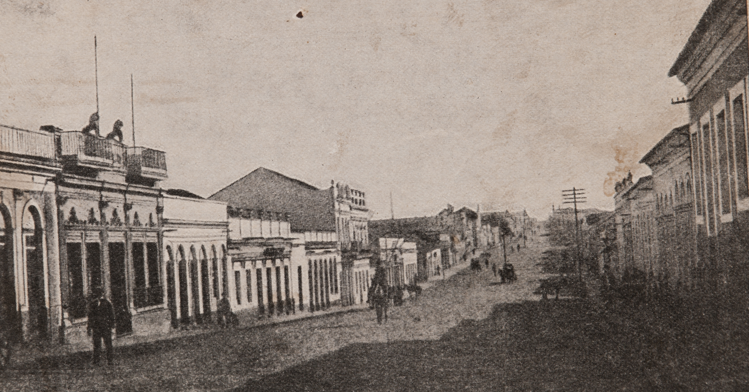 Obra que integra o acervo do Museu Paulista da USP. Coleção João Baptista de Campos Aguirra.